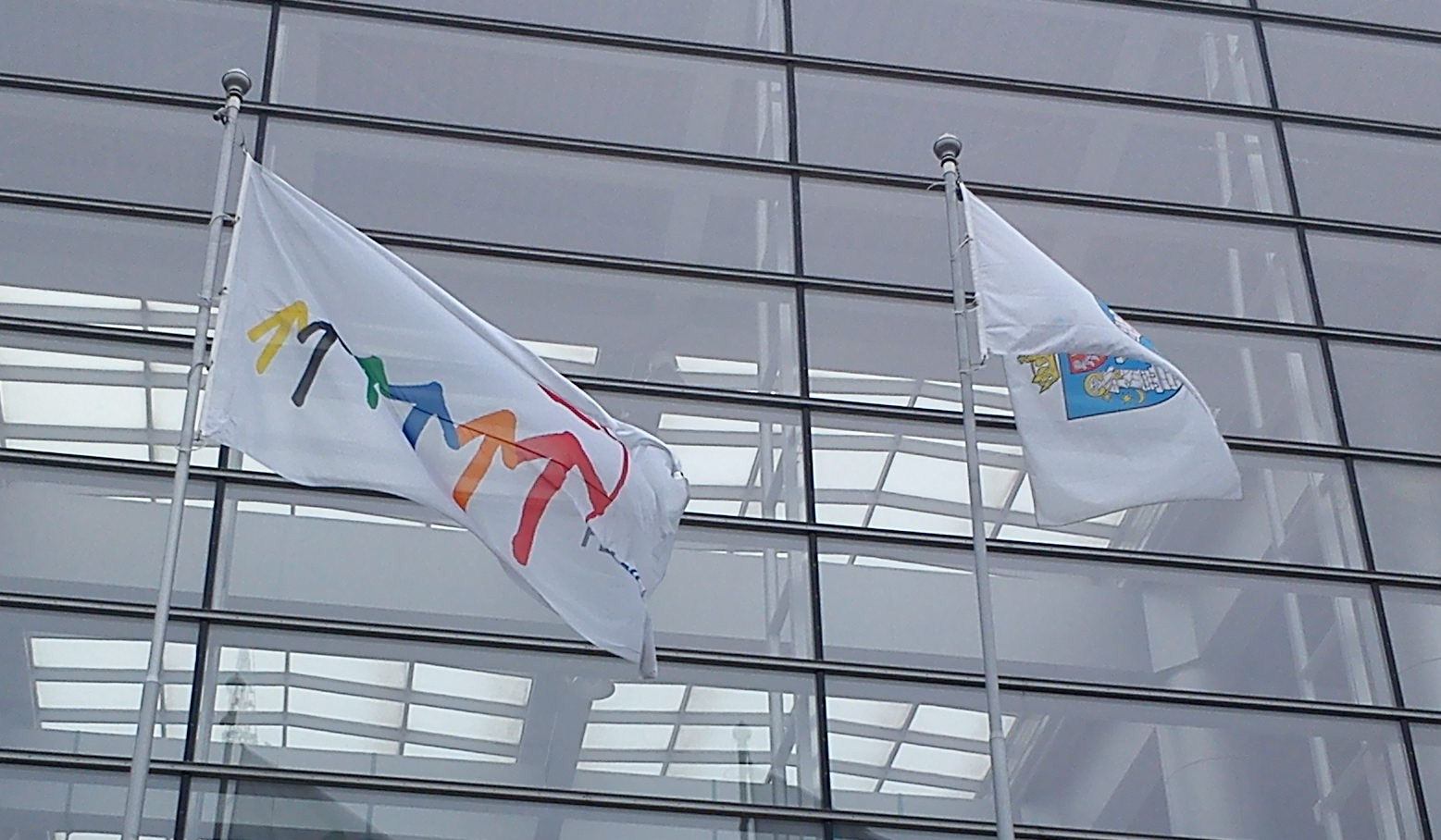 Polska prezydencja w Unii Europejskiej, Poznań, MTP